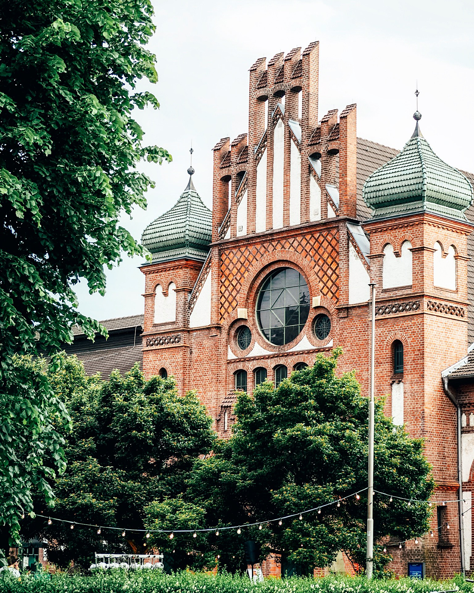 Lohnhalle der Zeche Zollern in Dortmund